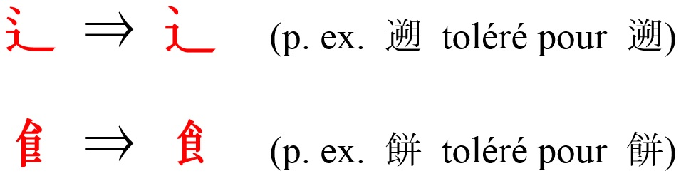 Formes tolérée vs formes canoniques (jōyō-kanji), 2010